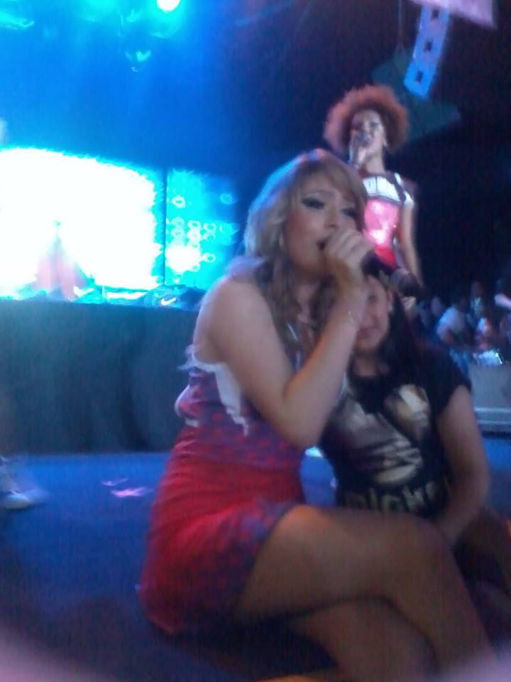 Bruna Rocha canta com fã durante apresentação do grupo Girls no festival No Capricho, em 2013.